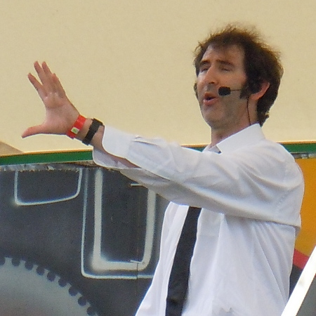 Ben Moor, Green Man Festival 2012, Solar Stage. Cropped.